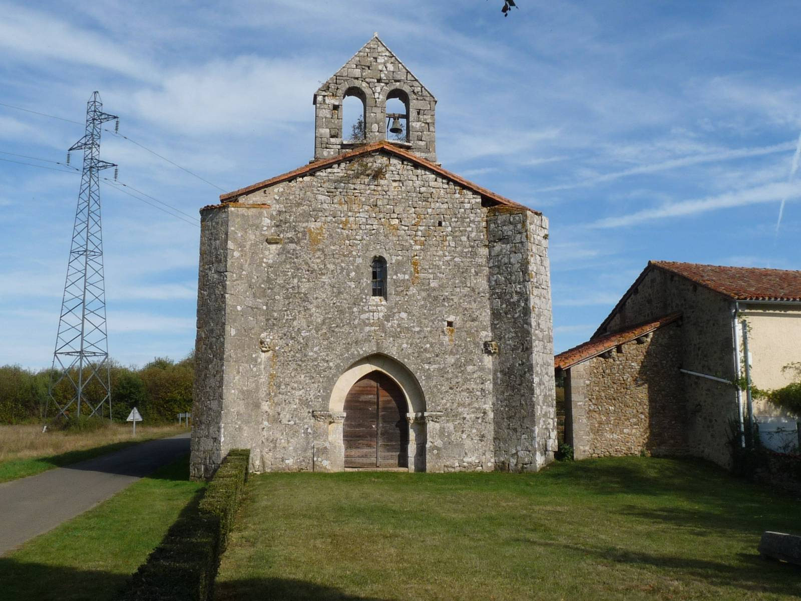 chapelle de Boisaugeais, Nanteuil-en-Vallée, Charente, France